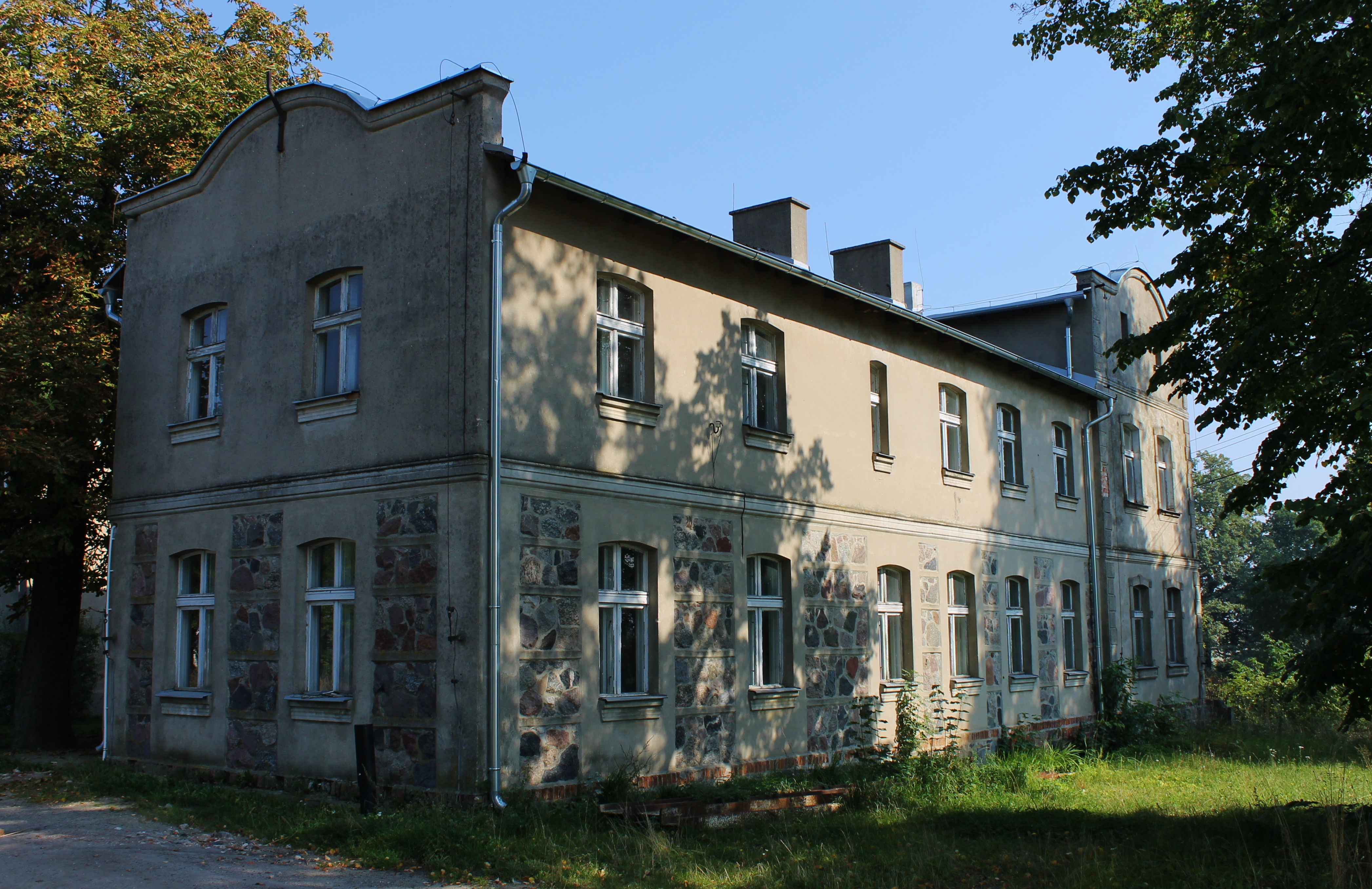 Rajgród, zespół dworski